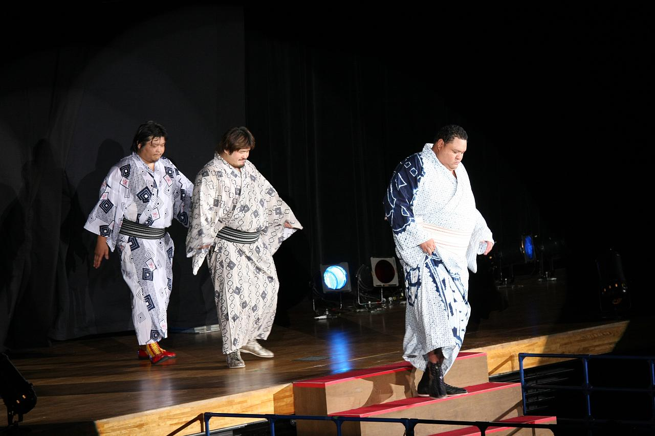 HUSTLE